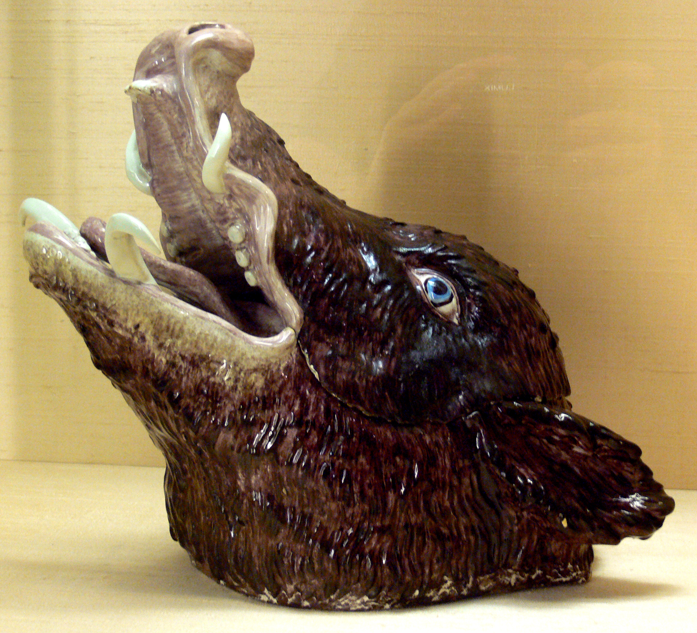 Eberkopfterrine (boar head tureen), Modell: Gottfried Becker; Maler: vermutlich Ignaz Zoschinger; Höchst, um 1748 Gallery: Reiss-Engelhorn-Museen, Mannheim